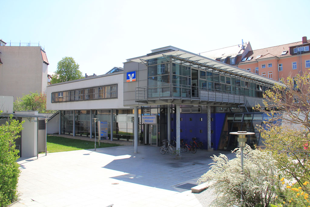 Zentrale der Volksbank Bautzen eG